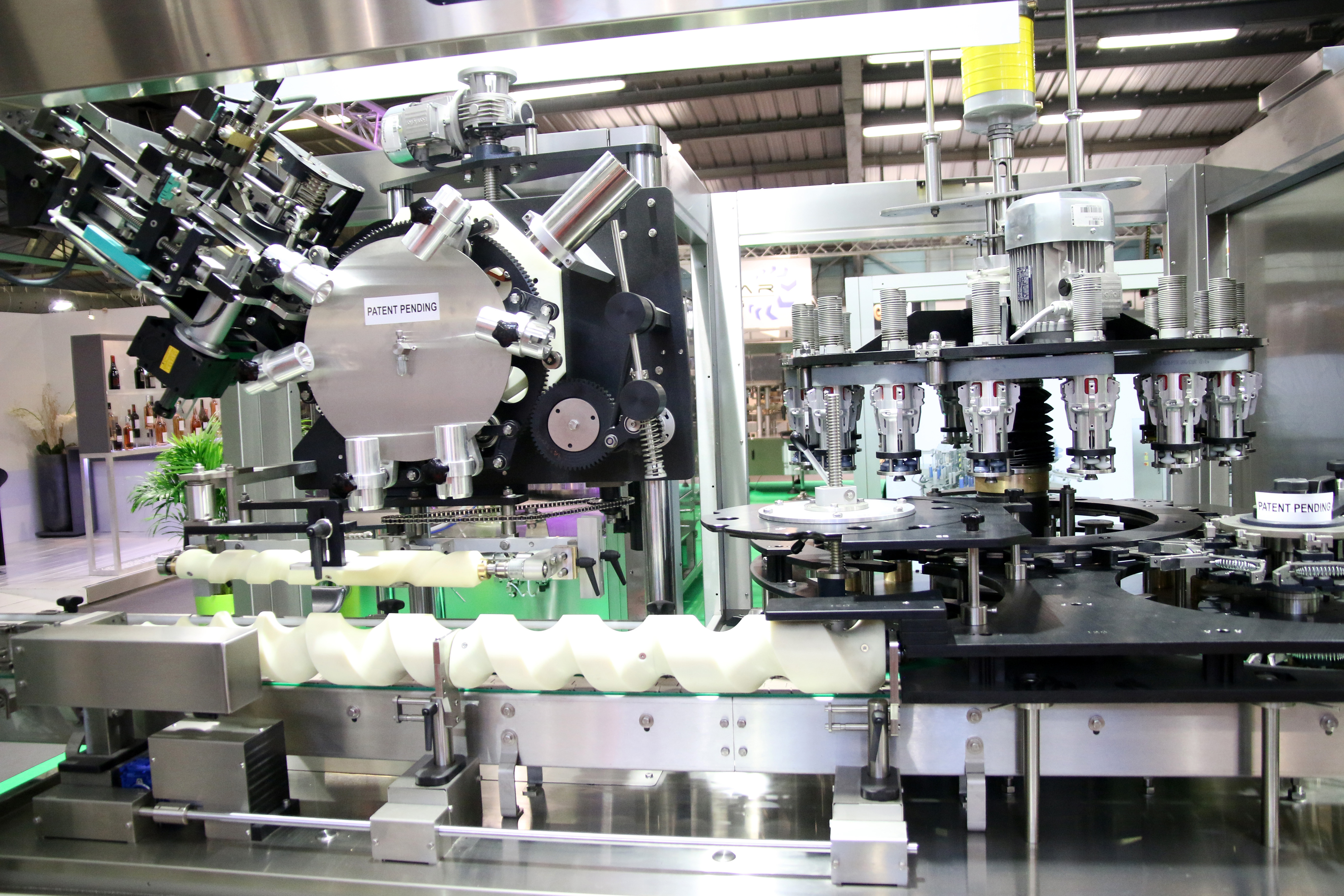 Chaine d'embouteillage